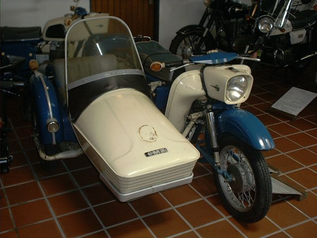 MZ ES 250/2 mit Stoye-Seitenwagen Super-Elastic, Bauzeit 1967–1973